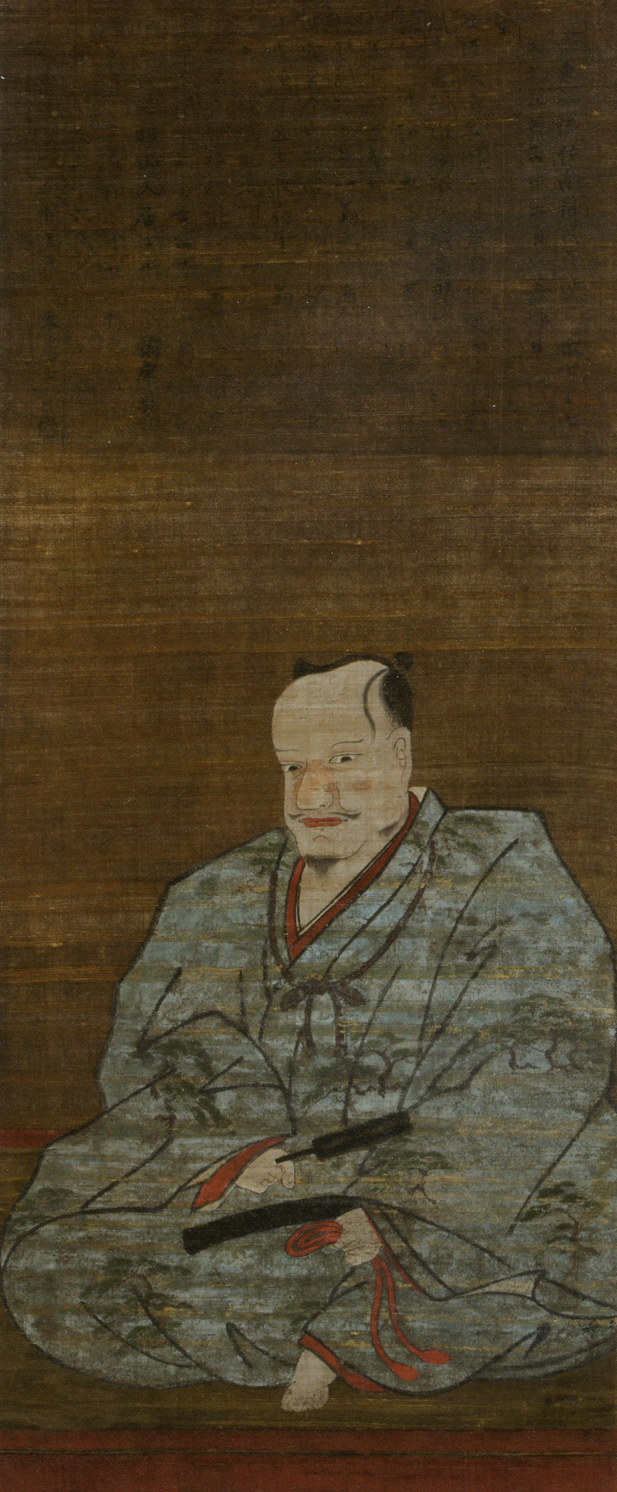 木曾義元の肖像。